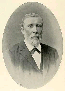 Inhalt: Foto von Friedrich Albert von Zenker Autor: unbekannt, aus dem 19. Jh.